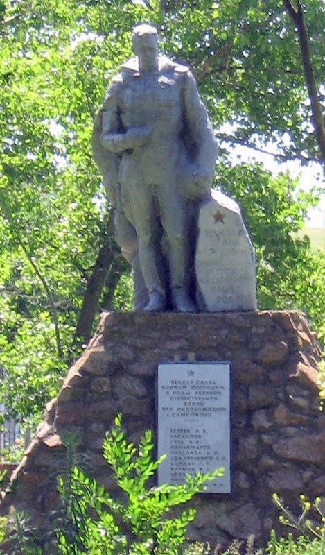 Пам'ятниу воїнам, що загинули при відвоюванні села Самсонове Тельманівського району